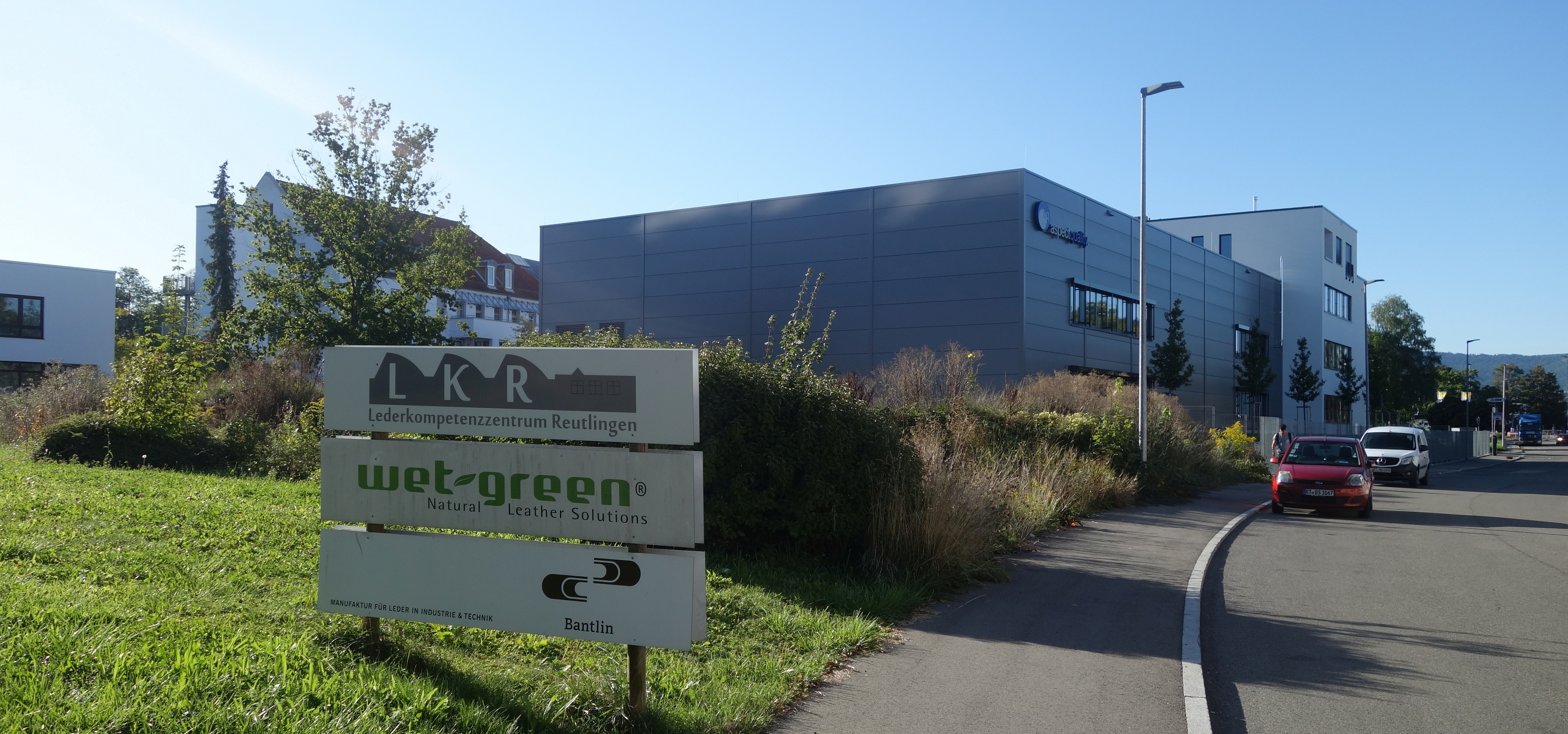 Lederkompetenzzentrum Reutlingen LKR, 2019.